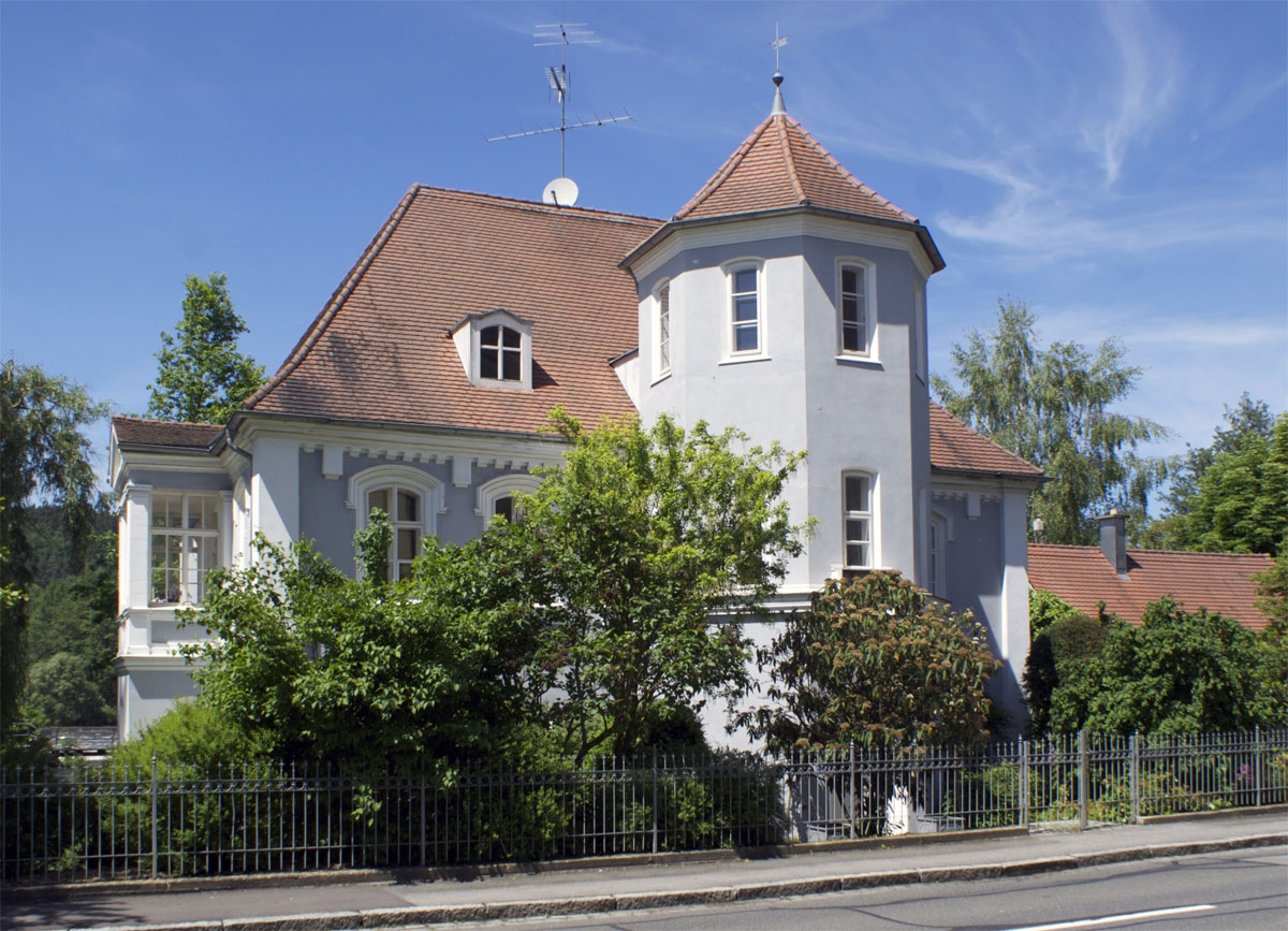 Altes Hammerschloß in Schwandorf, Ortsteil Ettmannsdorf